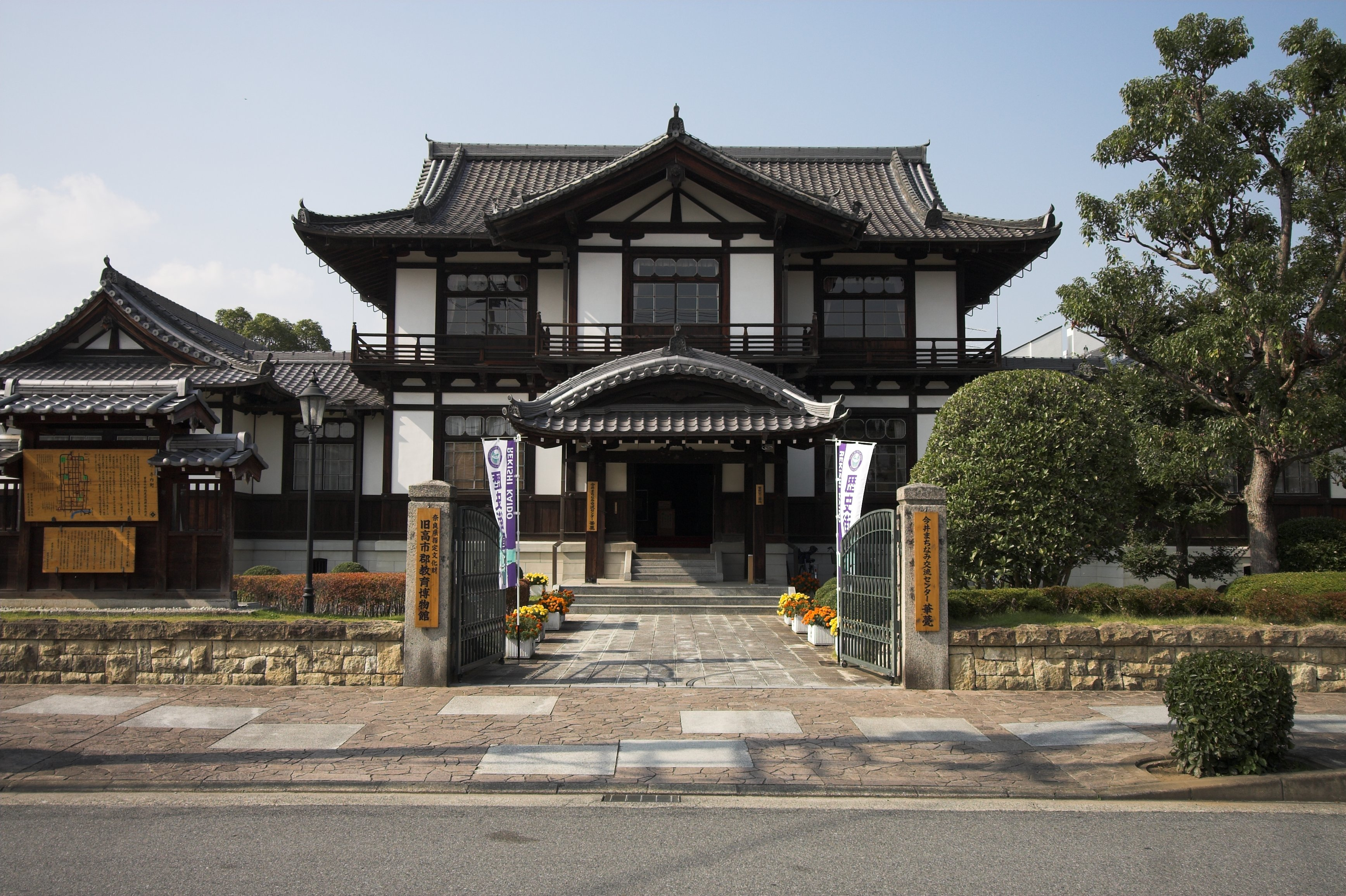 華甍(はないらか)旧高市郡教育博物館(奈良県橿原市, Japan)